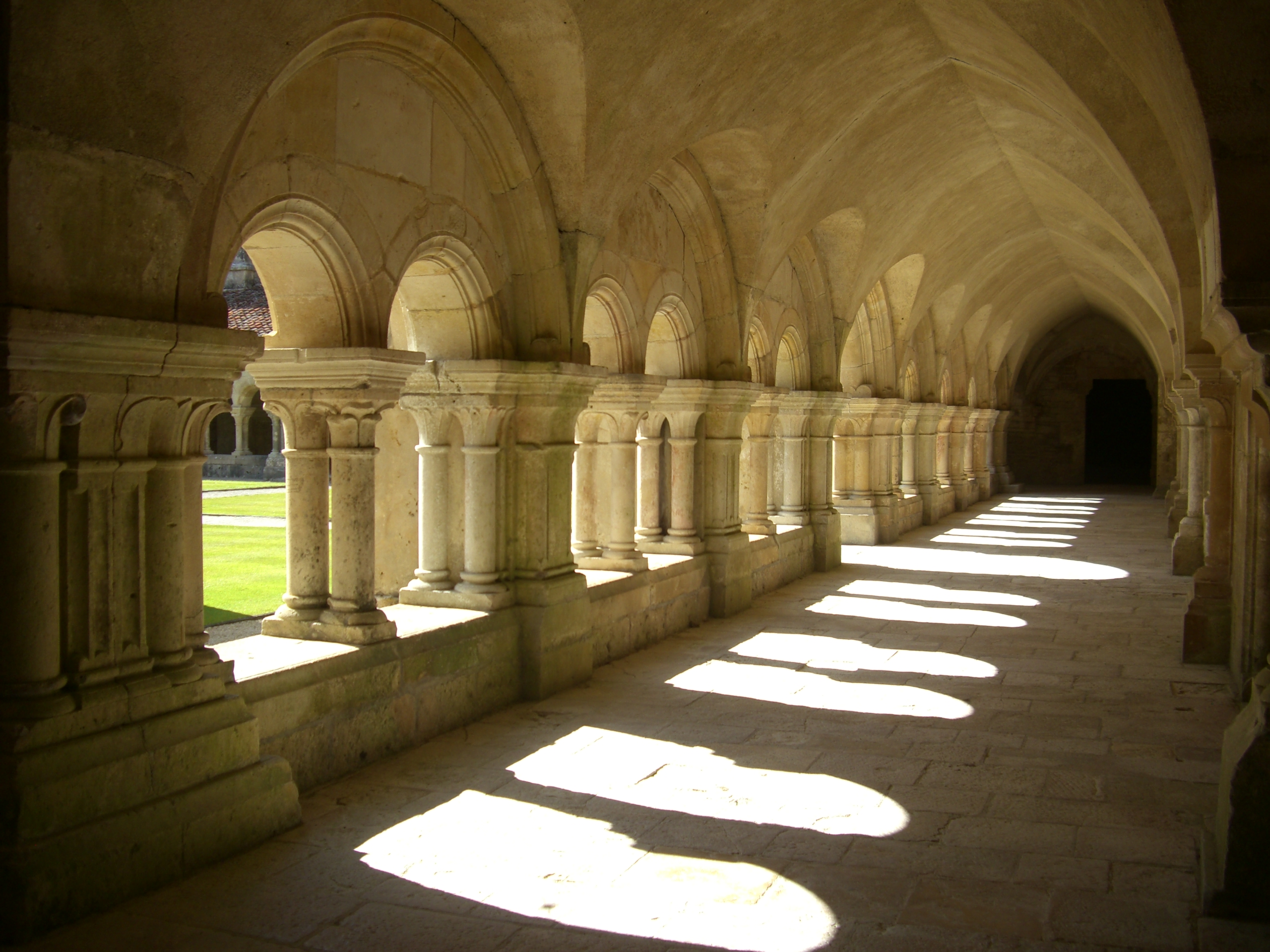 Abbaye de Fontenay (Classé) .